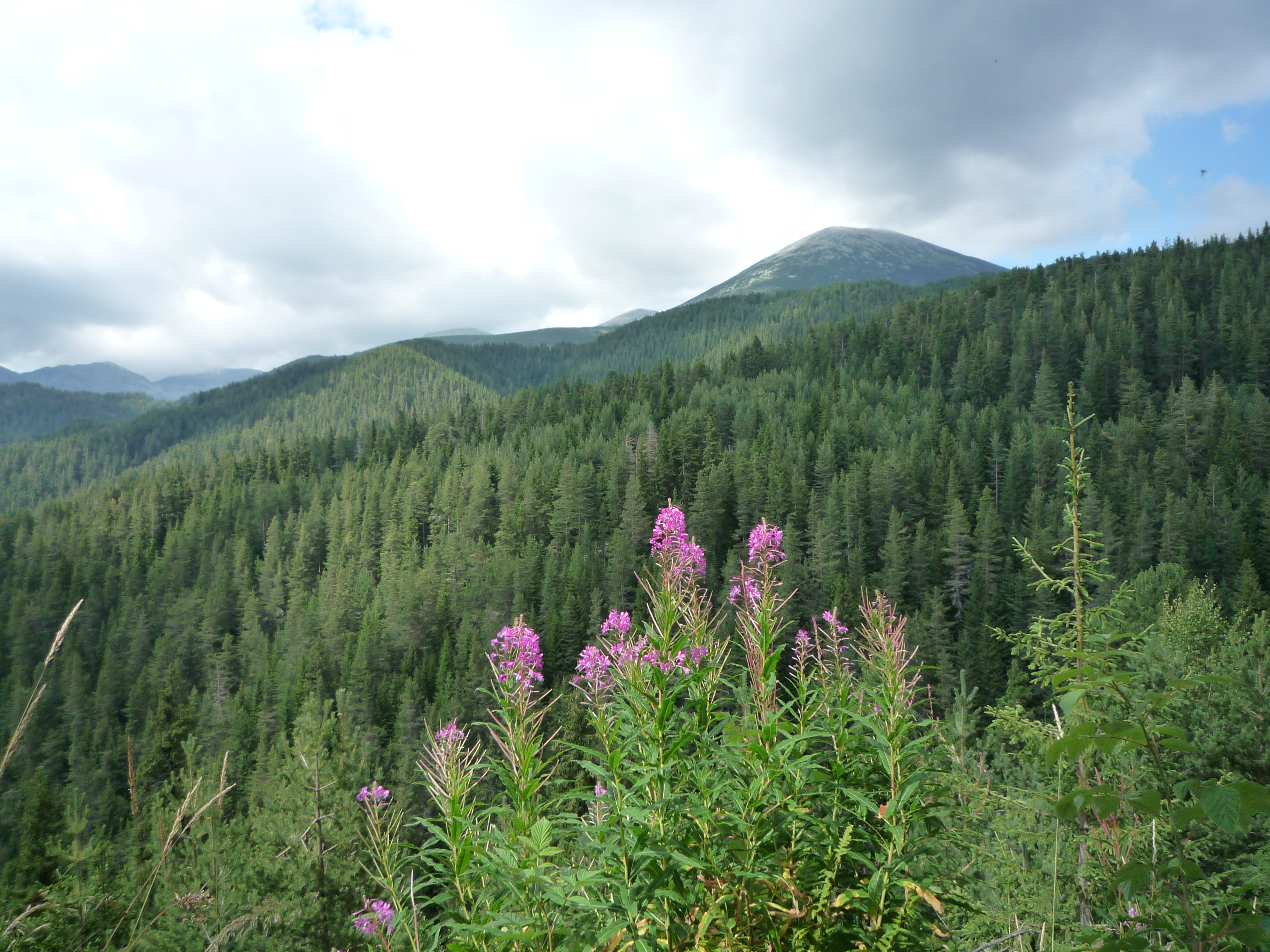 Bashliyski Chukar Peak 2683 m